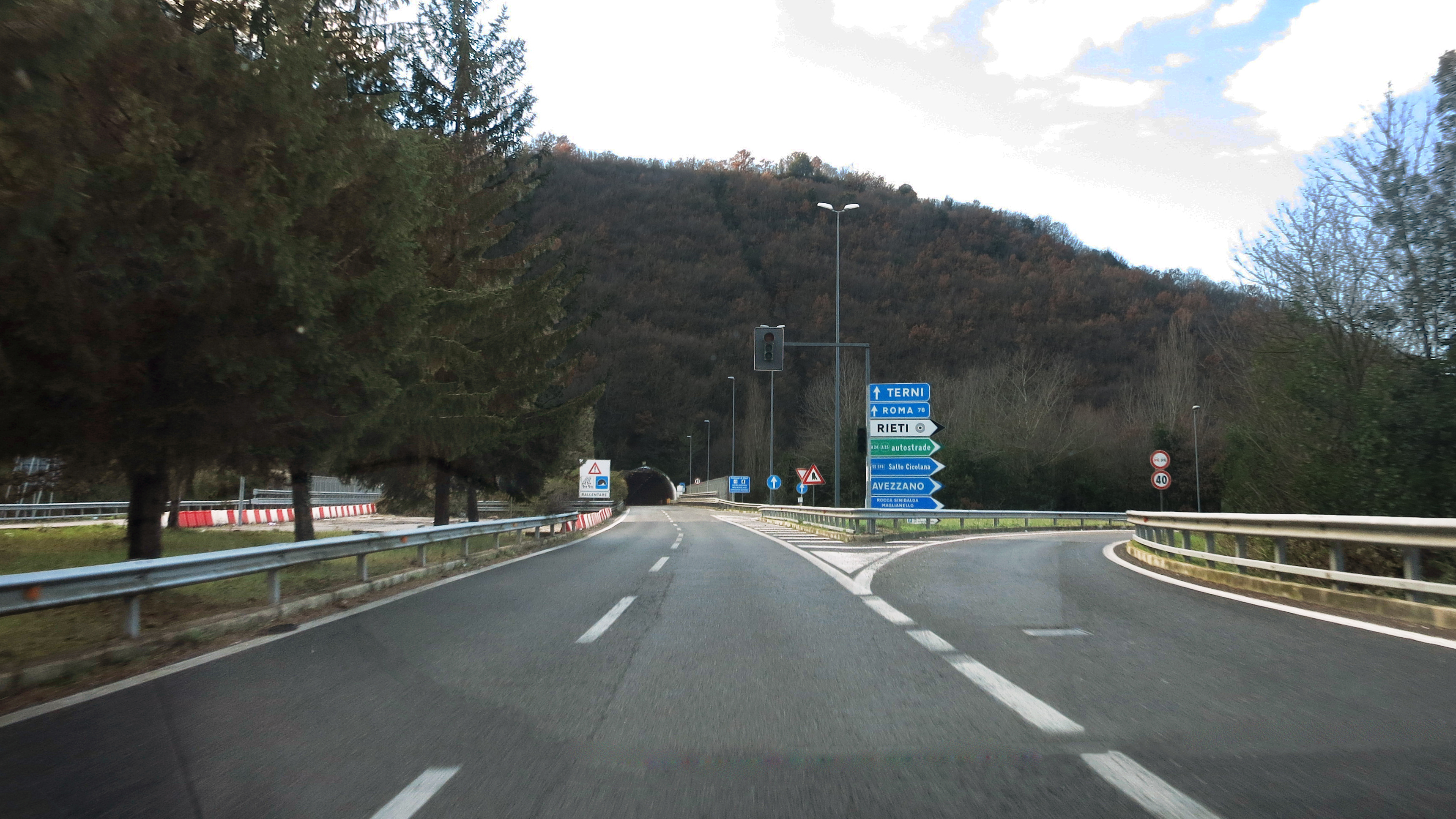 Svincolo "Rieti Est" posto sulla strada statale 4 Via Salaria (carreggiata in direzione Roma)